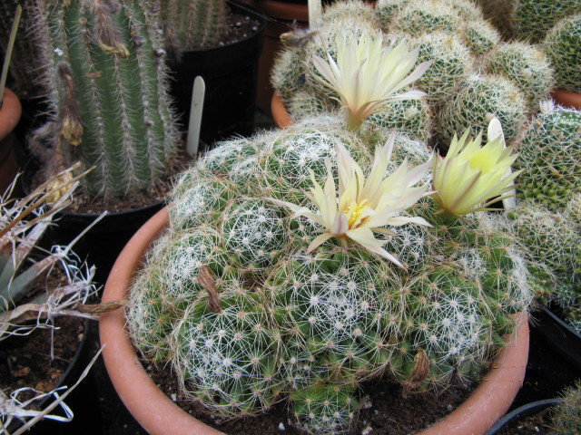 Mamillaria sphaerica